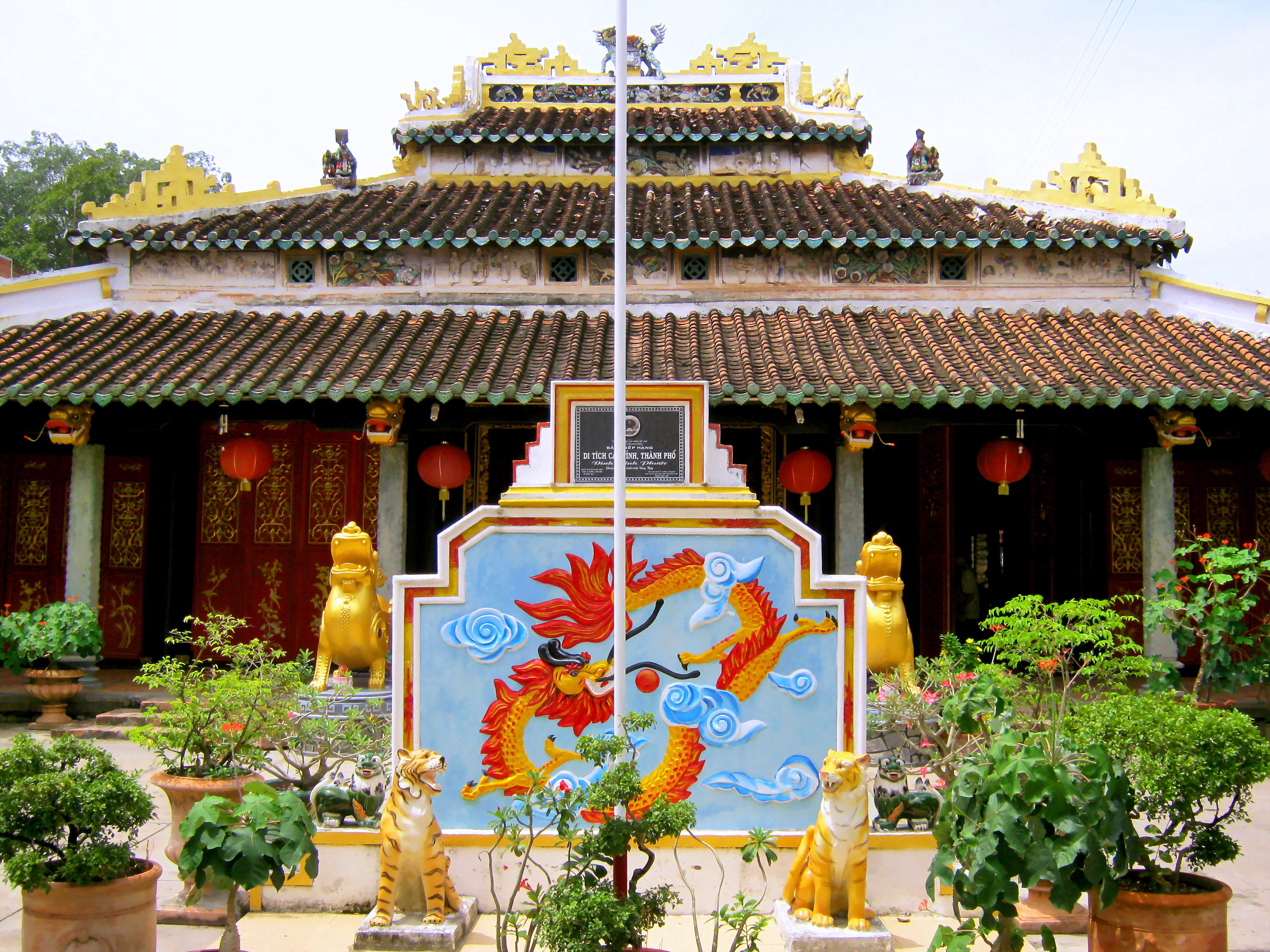 Đình Vĩnh Phước là một ngôi đình cổ tại thành phố Sa Đéc, tỉnh Đồng Tháp, Việt Nam.